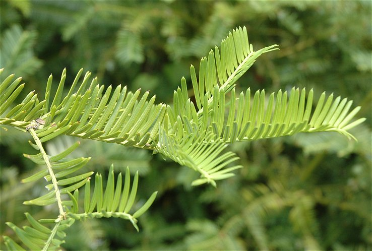 Cephalotaxus harringtonii / Nadeln / Botanischer Garten Berlin